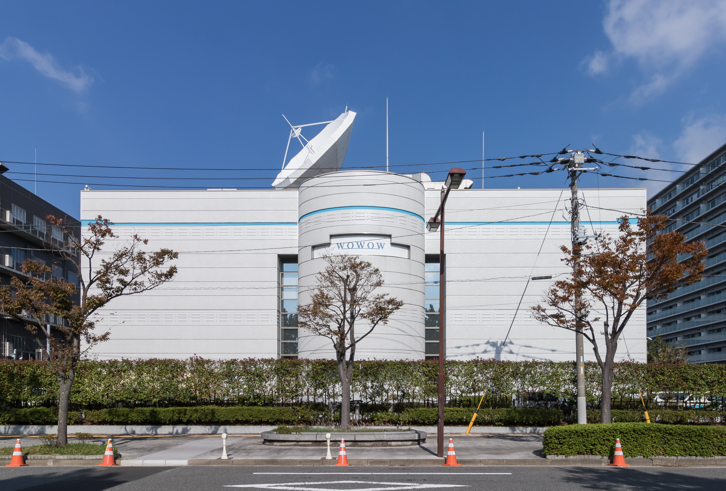 WOWOW 放送センター （東京都江東区辰巳)